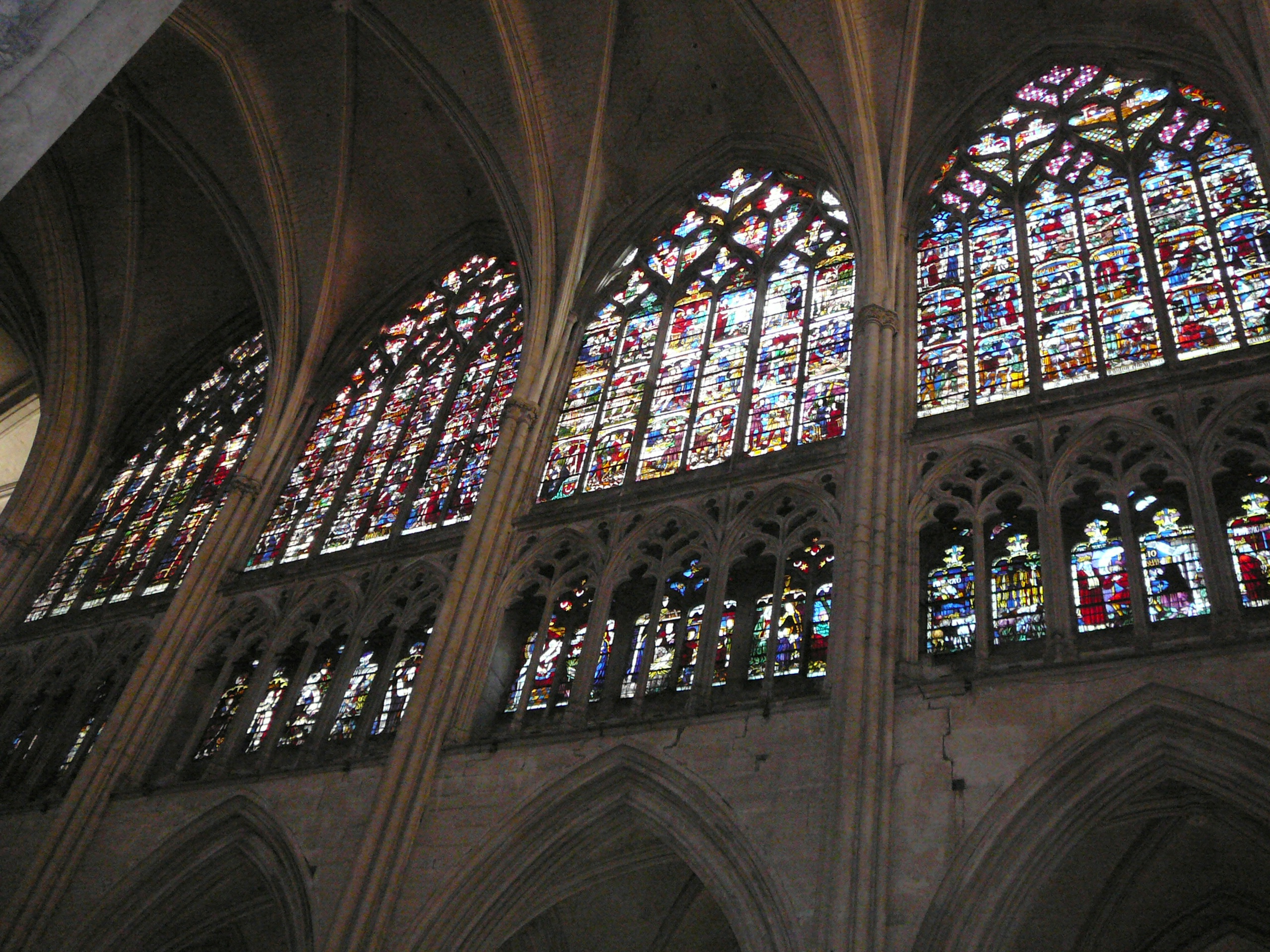 Vitraux de la nef